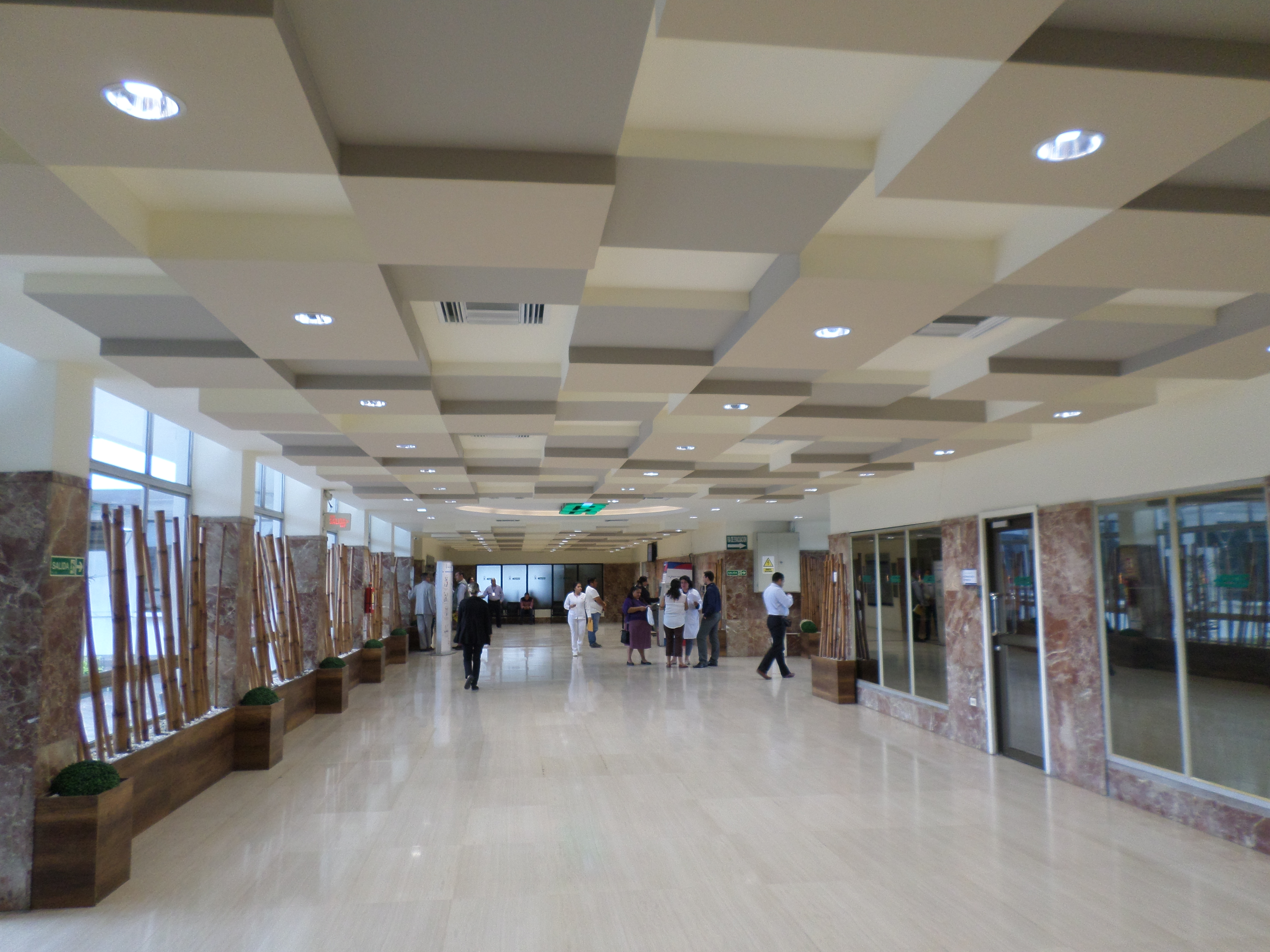 Area Administrativa